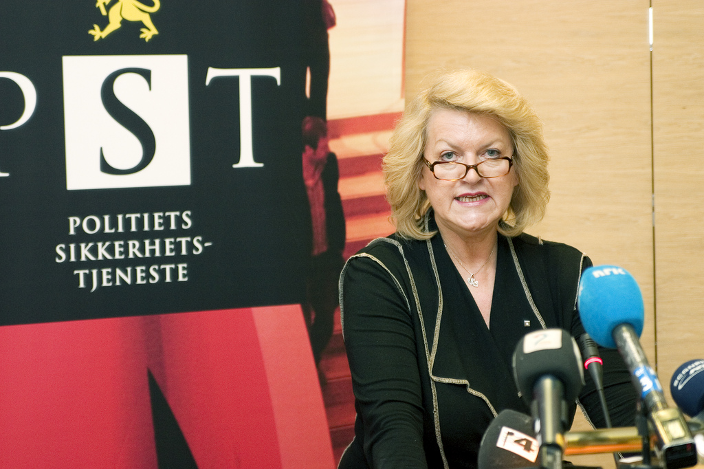 Politiets sikkerhetstjenestes (PST) årlige trusselvurdering ble lagt frem i dag. Trusselvurderingen er en analyse av forventet utvikling innenfor PSTs hovedansvarsområder. Vurderingen retter fokus mot forhold som kan påvirke norsk sikkerhet og skade nasjonale interesser i 2010. På bildet PST-sjef Janne Kristiansen.